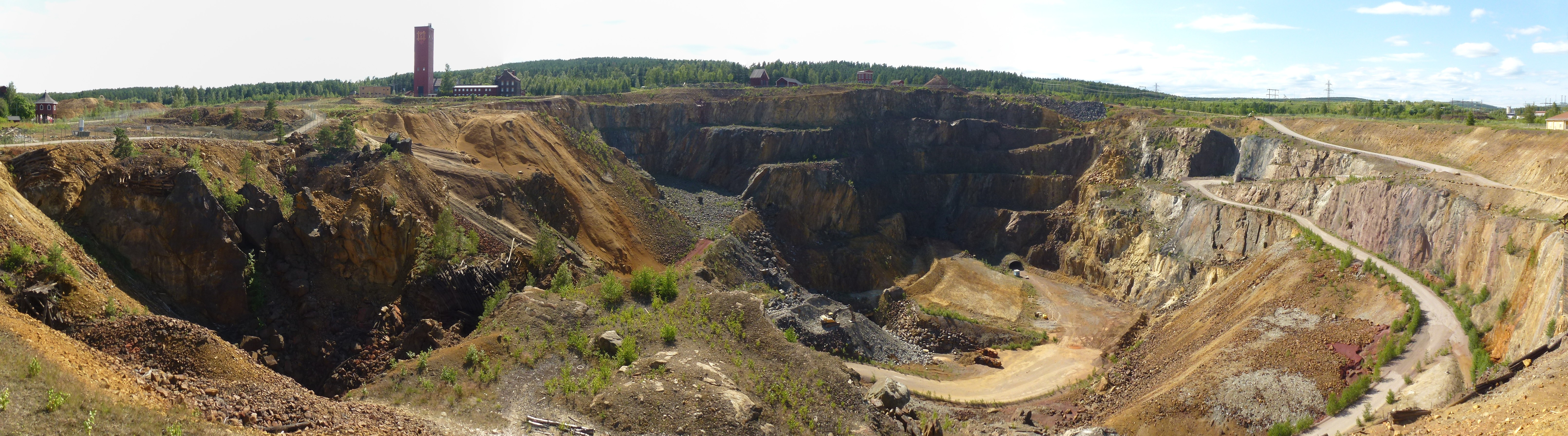 Falu gruva stora stöten panorama